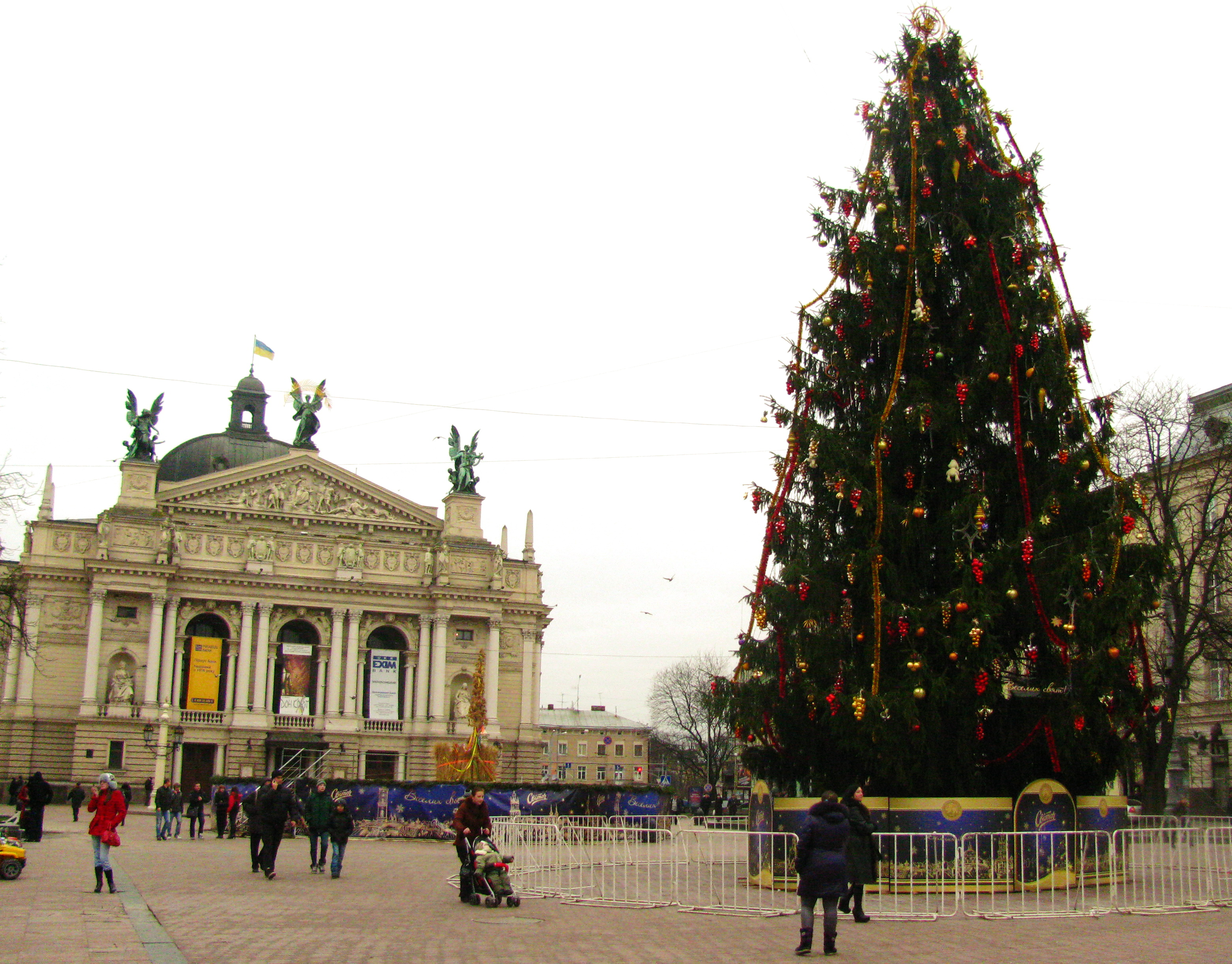 Ялинка перед Львівською оперою.jpg: Ялинка перед Львівською оперою